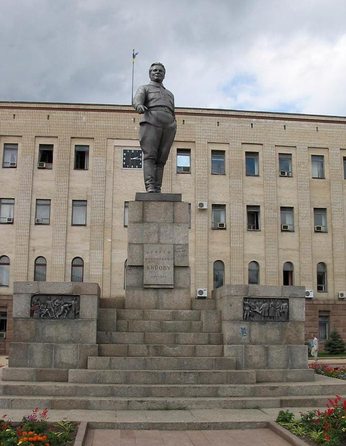 Пам'ятник_Сергію_Кірову_в_Кіровограді.jpg: Пам'ятник С.М. Кірову в місті Кіровограді (вересень 2007)